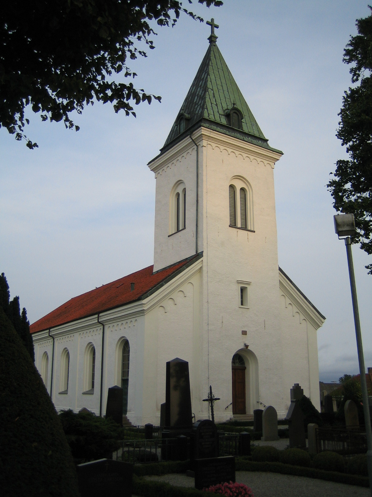 Södra Åby kyrka